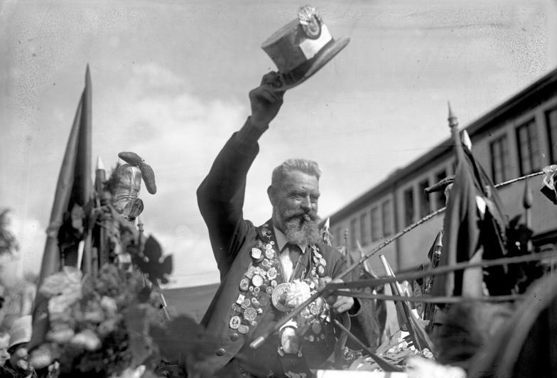 Der Einzug des "Eisernen Gustavs" in Berlin ! Der "Eiserne Gustav", welcher mit seiner Droschke von Berlin nach Paris und zurück fuhr, wurde unter großem Jubel der Bevölkerung in Berlin empfangen. Der "Eiserne Gustav" dankt von seiner blumengeschückten Droschke der Bevölkerung für den jubelnden Empfang.